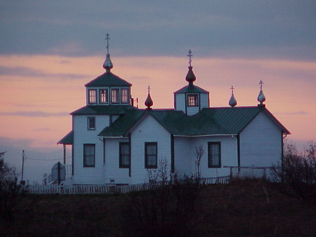 Russian Orthodox Church, Ninilchik, Alaska